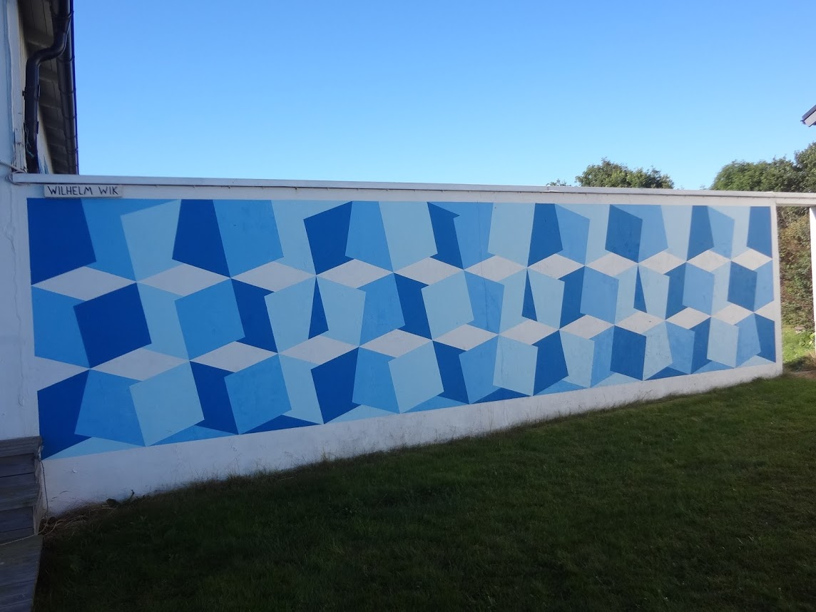 Wilhelm Wik: Romber dansar rytmiskt på muren